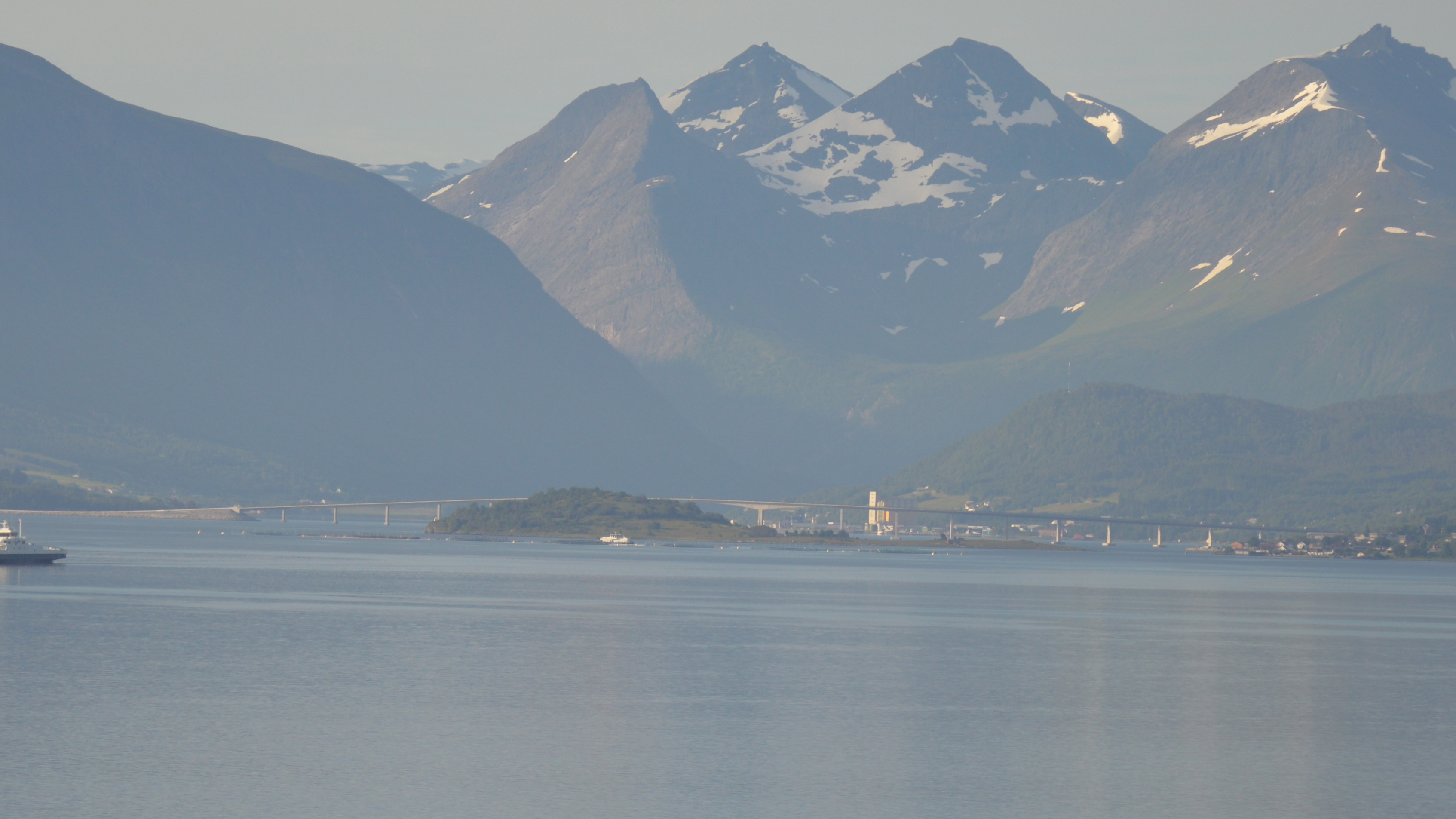 Feøya